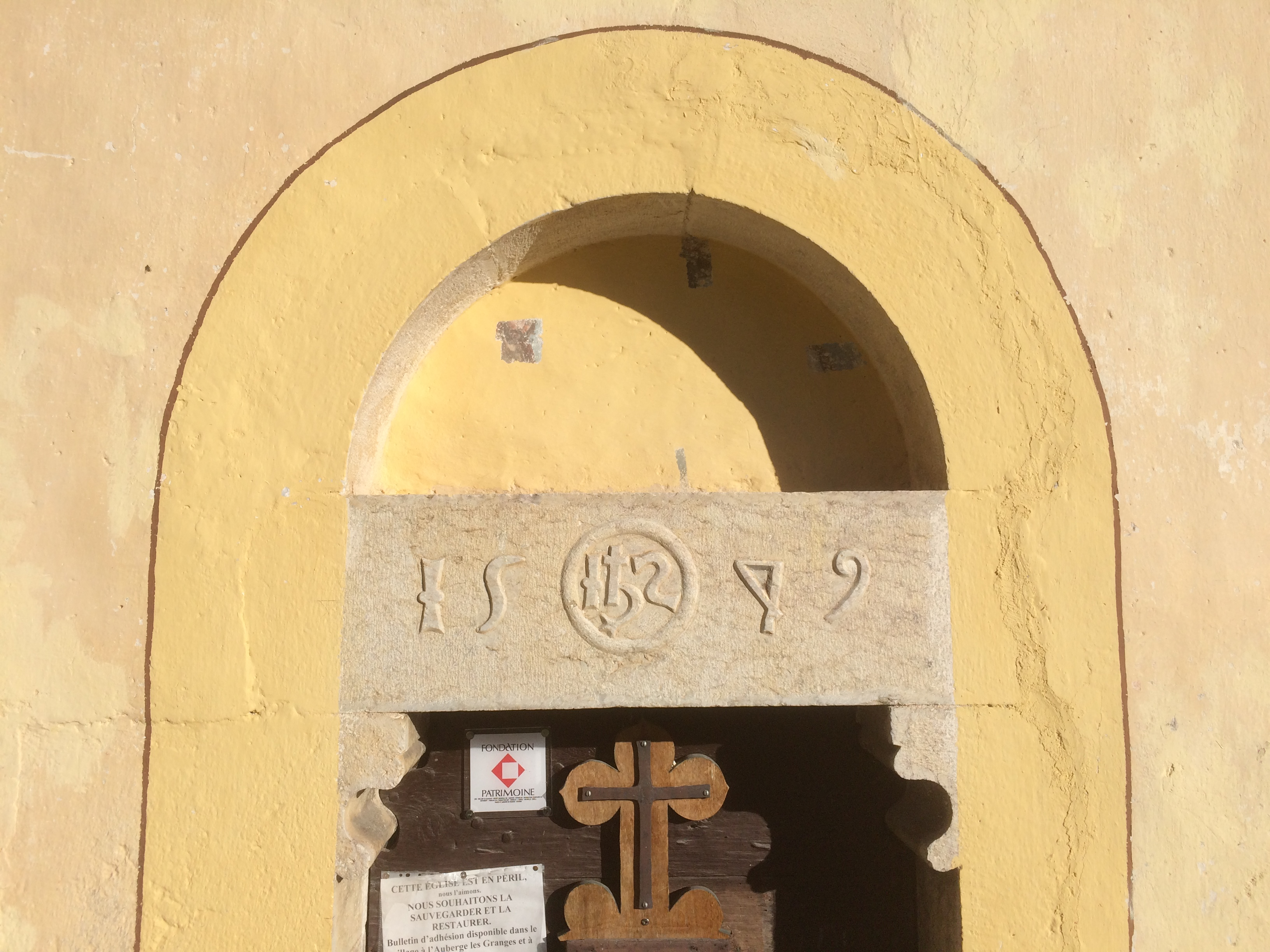 Gravure 1579 et IHS. Au-dessus ont distingue des sondages discrets pour préparer une recherche et restauration des motifs des fresques.